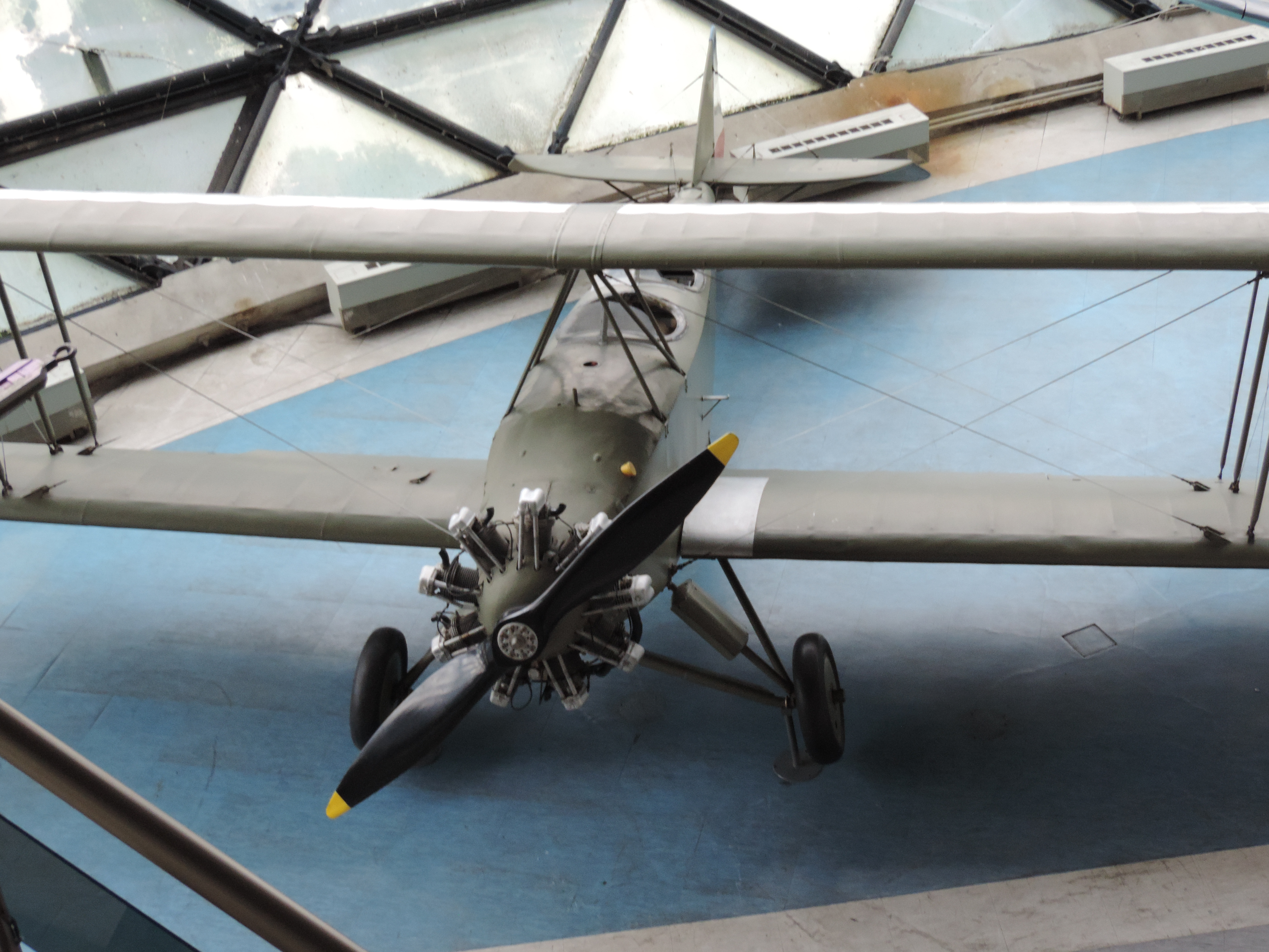 Znaj Fizir FN – Walter im Belgrader Aviation Museum